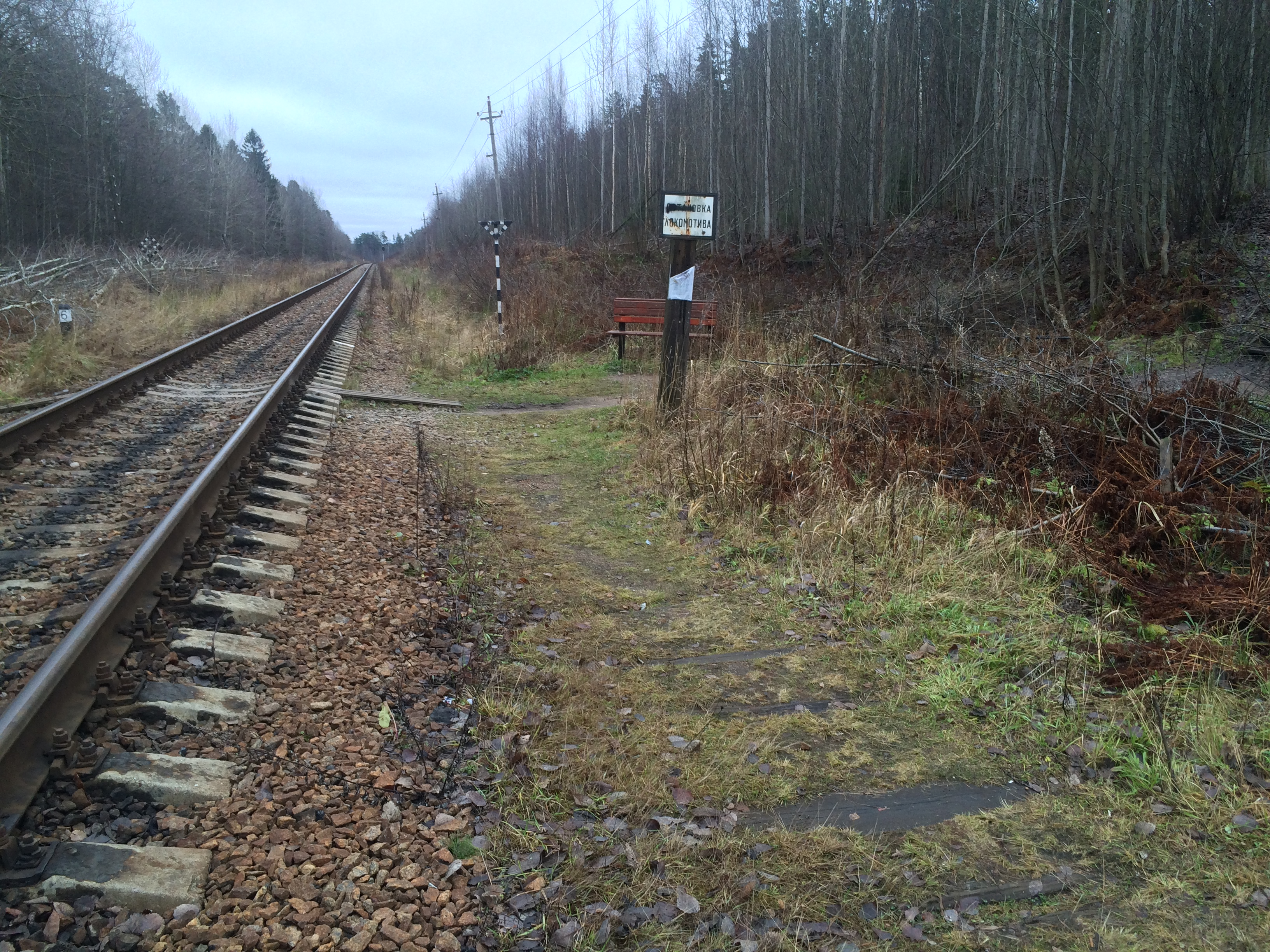 пл 70 км (шпалы)